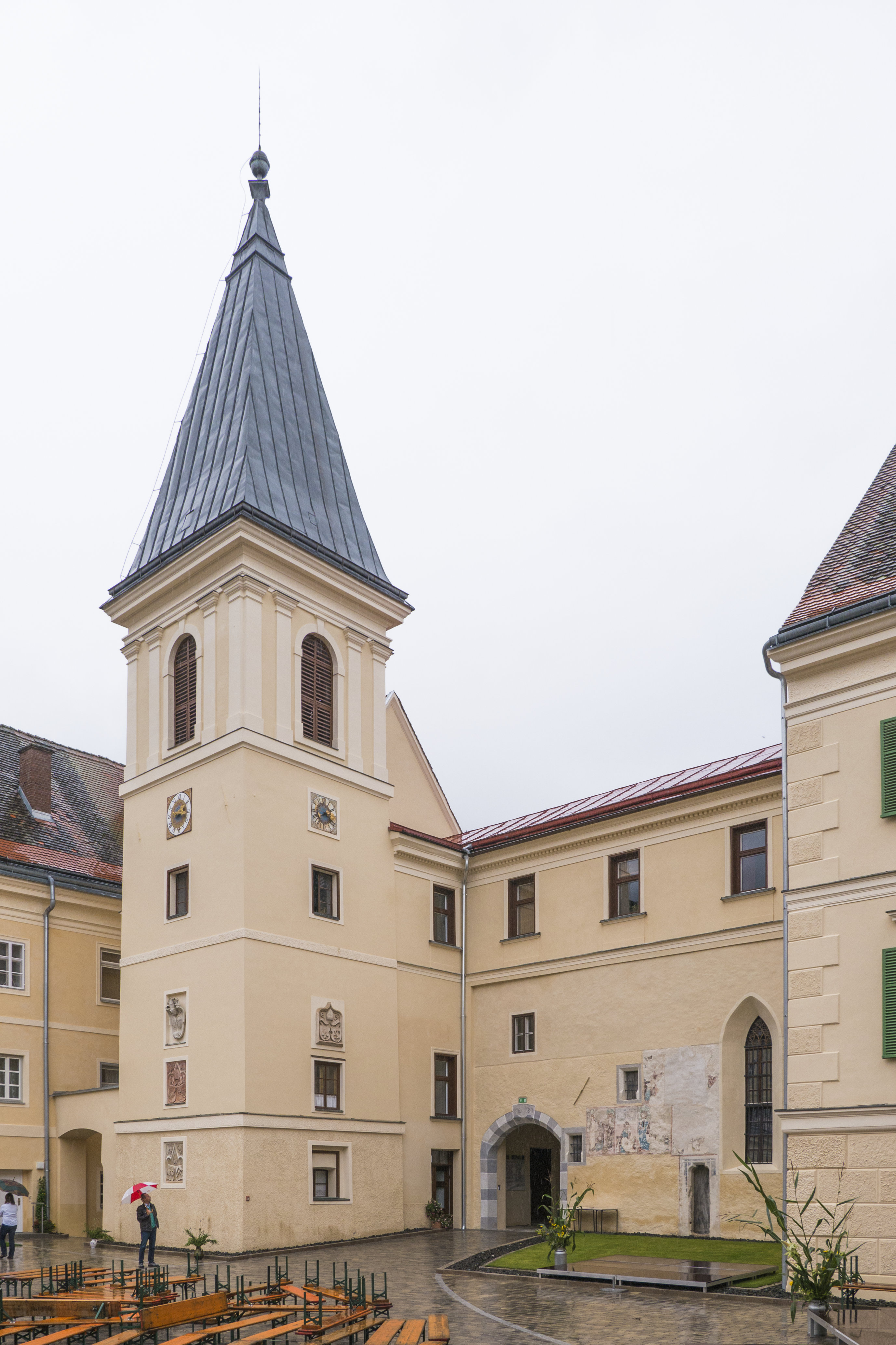 Schloss, Burg-/Schlosskapelle